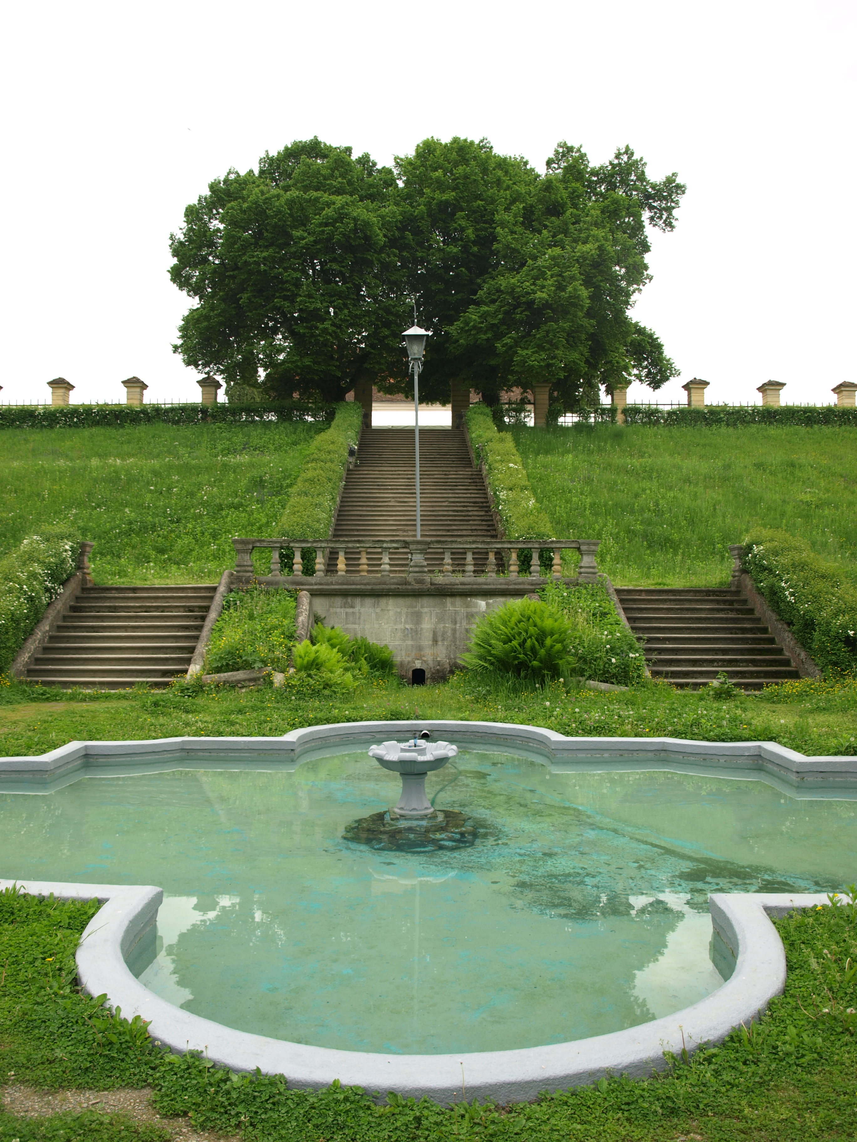 Fantana din parcul Bruckenthal din Avrig